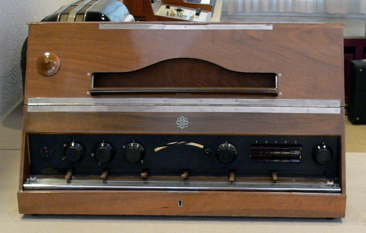 Volkstrautonium, Telefunken Berlin, 1933/1934 Musikinstrumentenmuseum Berlin, Kat.-Nr. 5264